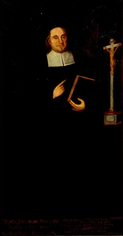 Bildnis Paul Gerhardt, Öl auf Leinwand, 2,05 × 1,05 m